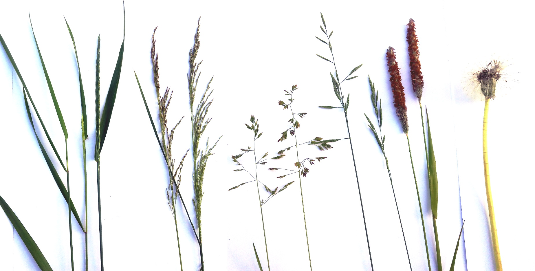 Olika grässorter plockade 21 juni 2019 i en vildvuxen gräsmatta runt ett hus i Rundvik (norra kusten i ångermanland), Sverige. En fröställning av maskros är med som storleksreferens.